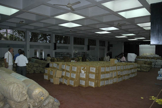 Storage room, Sarvodaya HQ